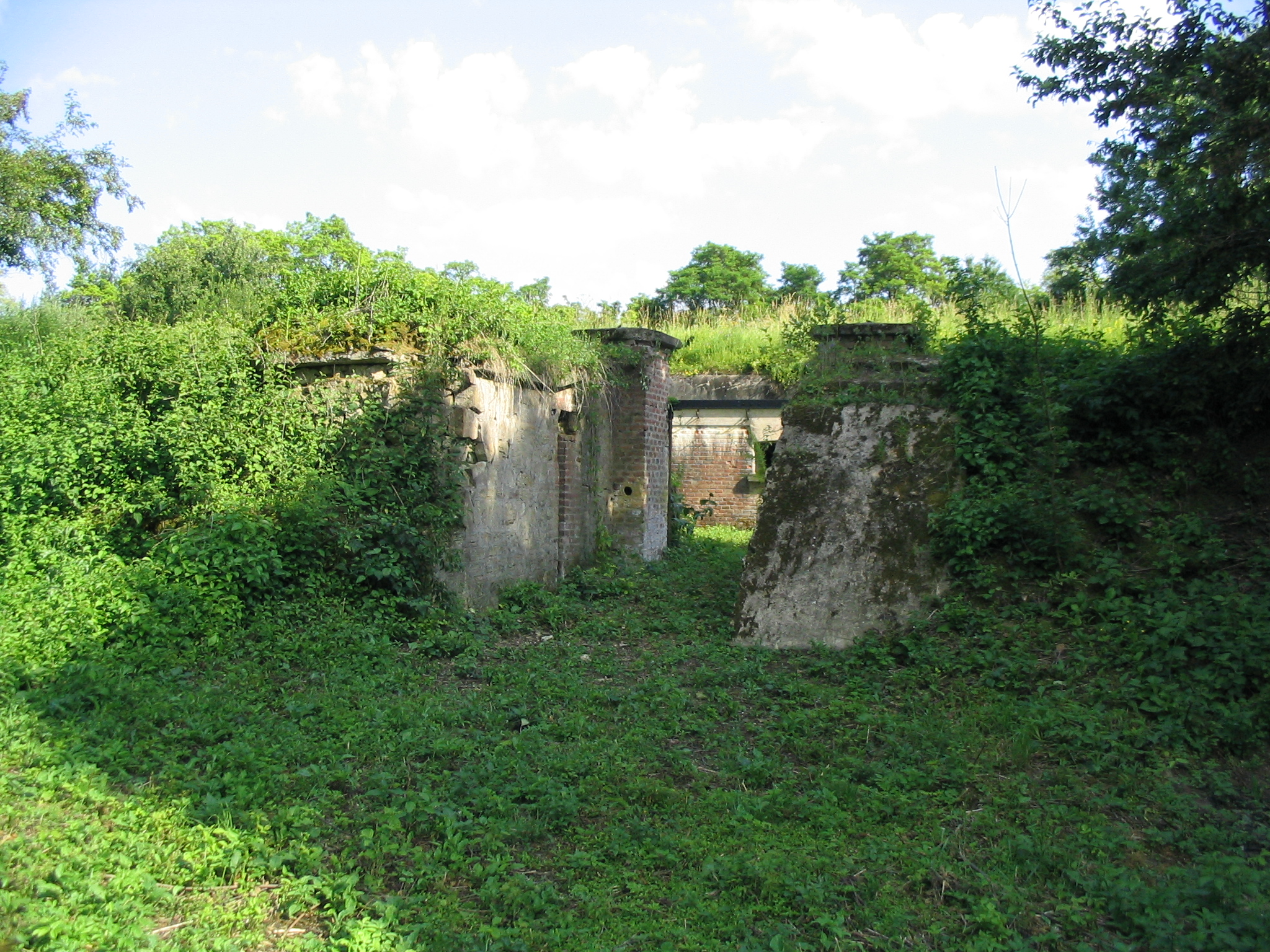 Fort III "Łuczyce" Author: Goku122